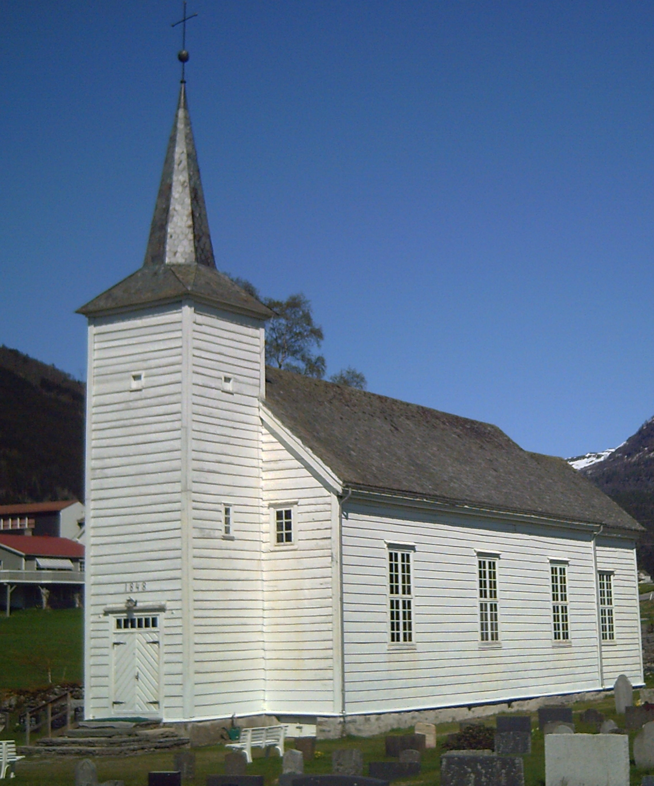 Viksdalen kirke, Church of Viksdalen